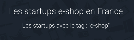 Plusieurs mots anglais dans le même titre.